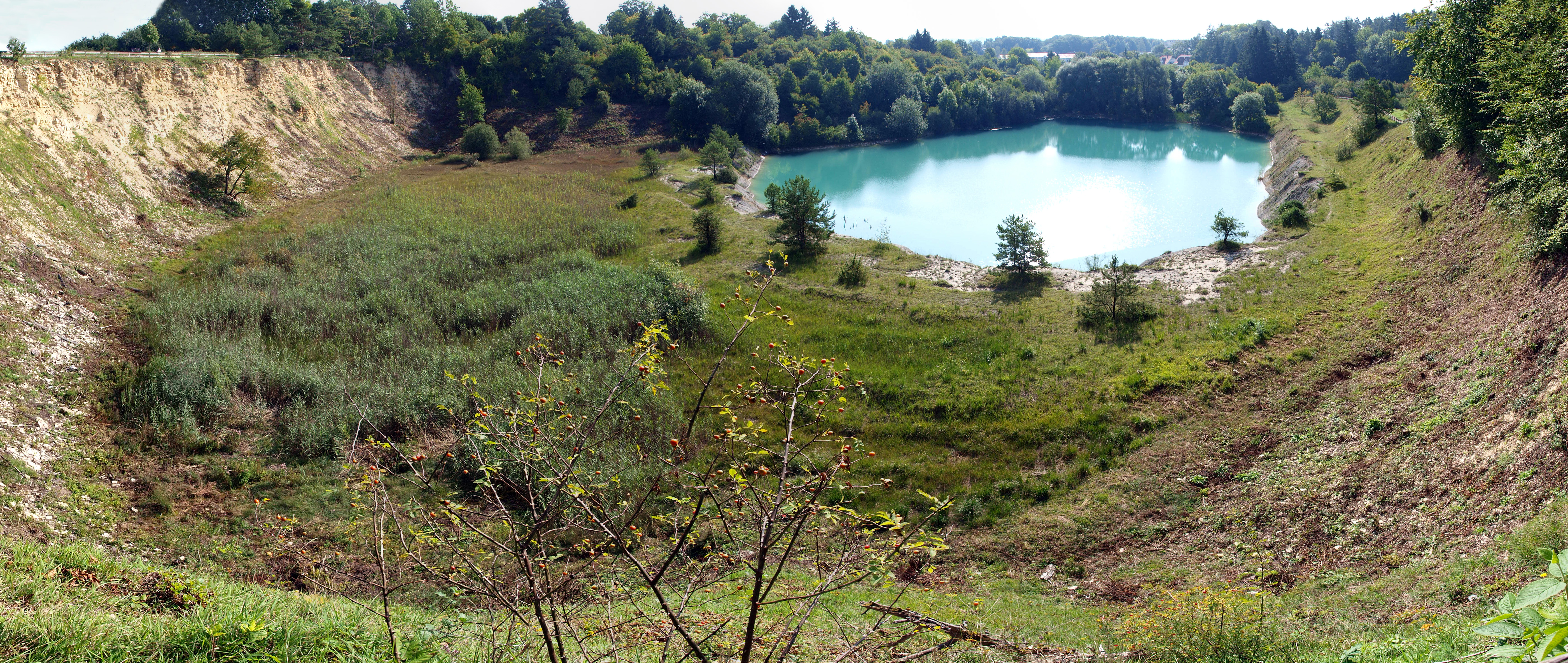 Das Naturschutzgebiet Blauer Steinbruch im Westen der Stadt Ehingen (Donau). Panoramaaufnahme, zusammengesetzt aus acht Einzelaufnahmen.